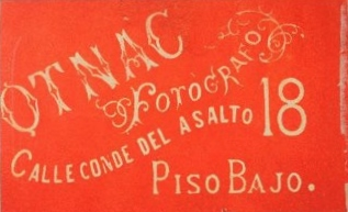 Revers utilitzat en diverses fotografies de Joan Cantó i Esclús